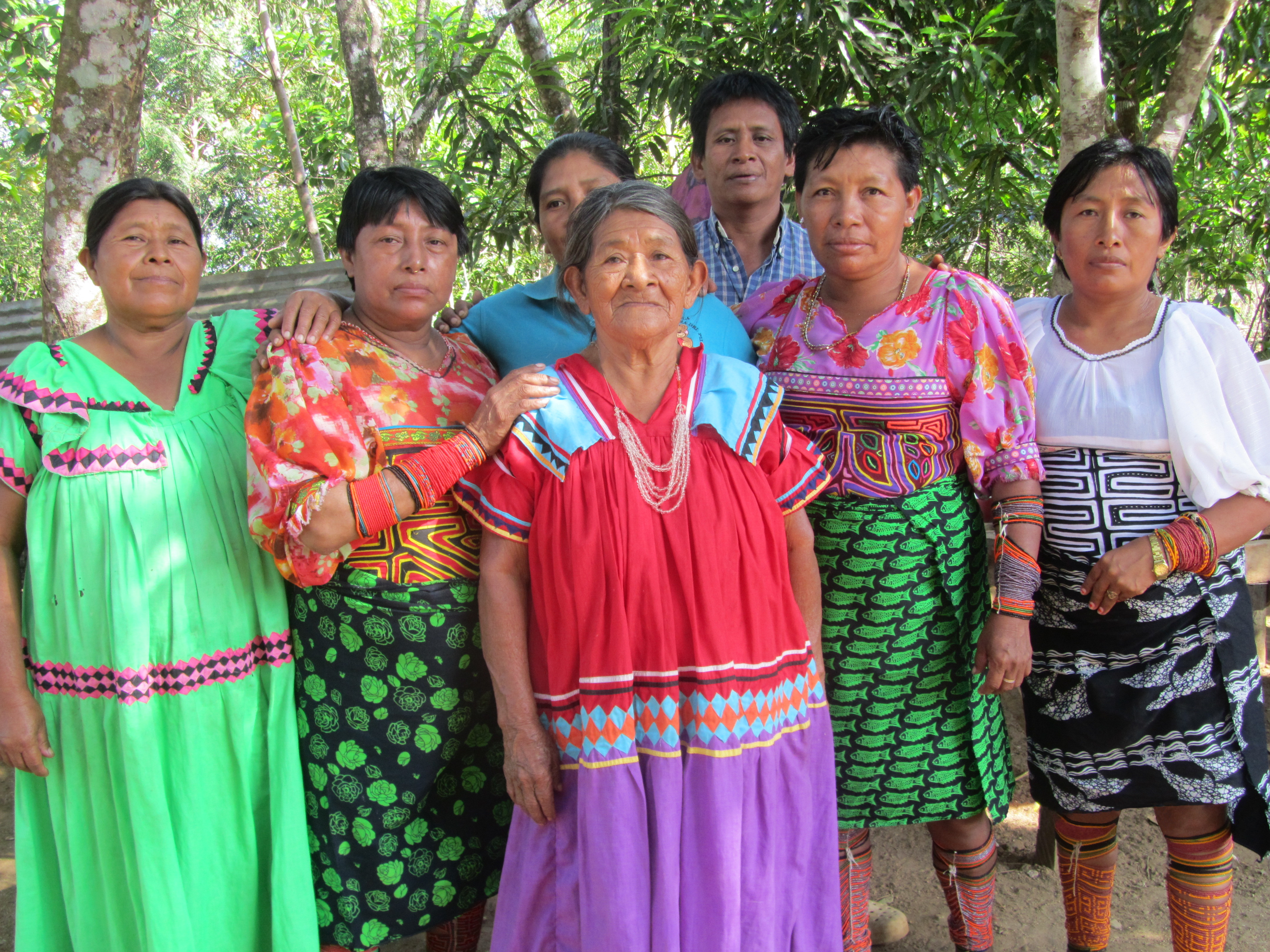 Tomada durante un encuentro cristiano en la provincia de Veraguas.